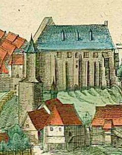 Fragment widoku autorstwa Brauna i Hogenberga z 1617 roku przedstawiającego gotyckie skrzydło południowe zamku (od strony Wisły) w formie nadanej mu pod koniec wieku XV w czasach panowania Kazimierza Jagiellończyka.